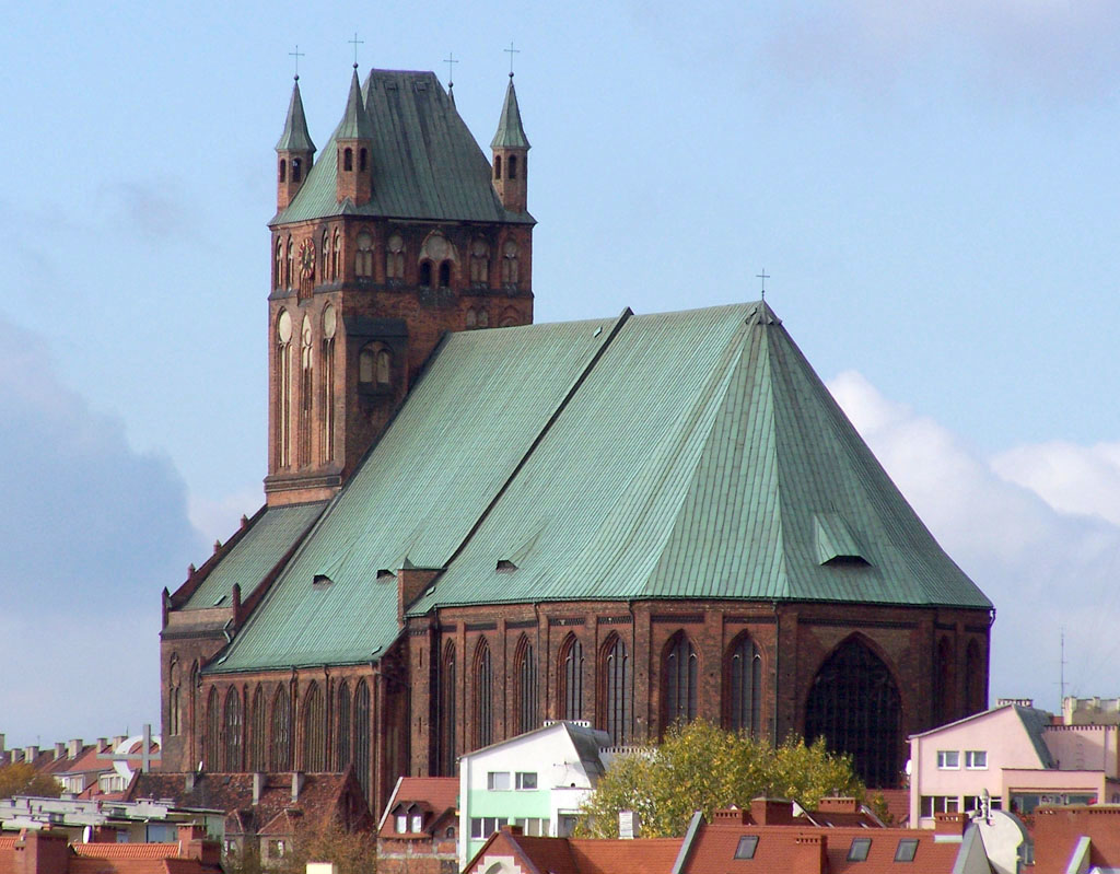 Bazylika Archikatedralna św. Jakuba w Szczecinie